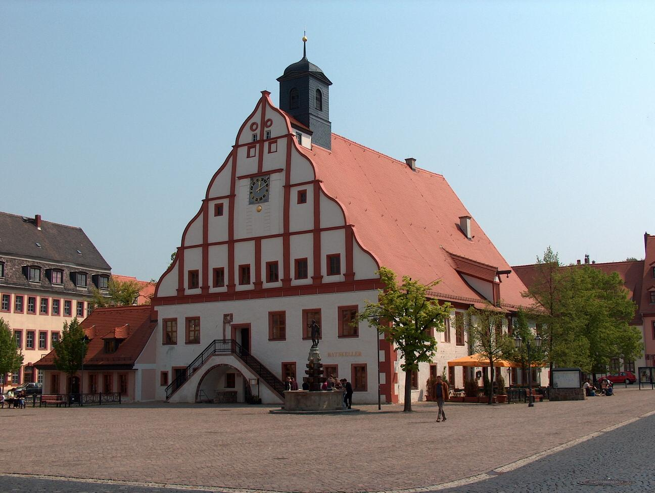 Rathaus Grimma am Markt